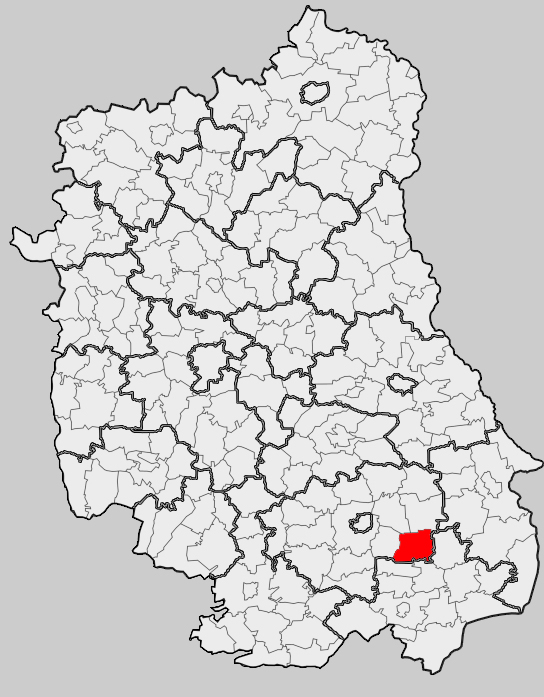 Map of gmina Komarów-Osada, Zamość county, Lublin voivodship Mapa gminy Komarów-Osada, powiat zamojski, województwo lubelskie